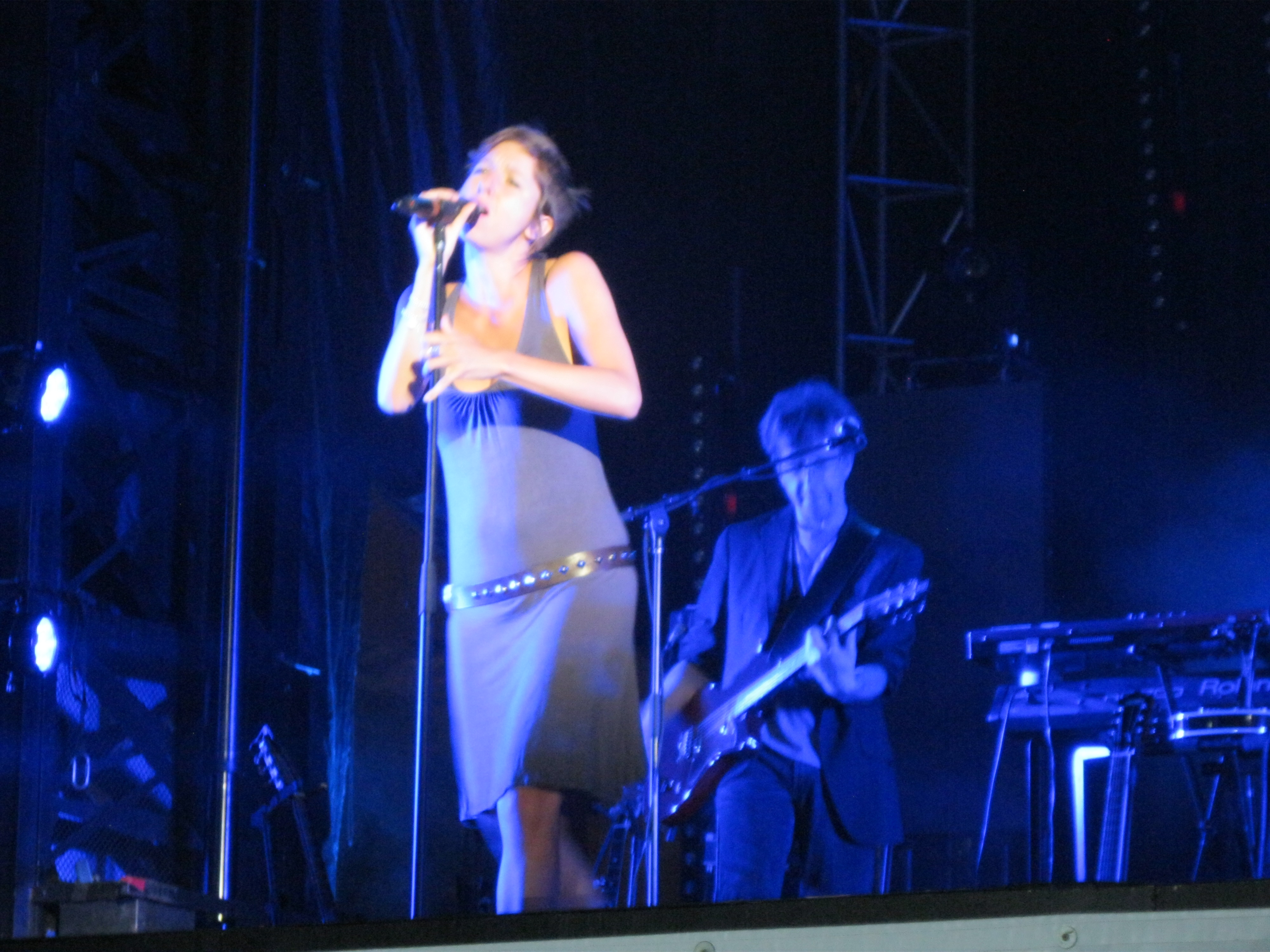 Daniel Lavoie a offert une performance aux FrancoFolies de Montréal, le 20 juin 2013, à la place des Festivals. Bruno Pelletier, Catherine Major, Paul Daraiche et Slim Williams ont participé au spectacle.